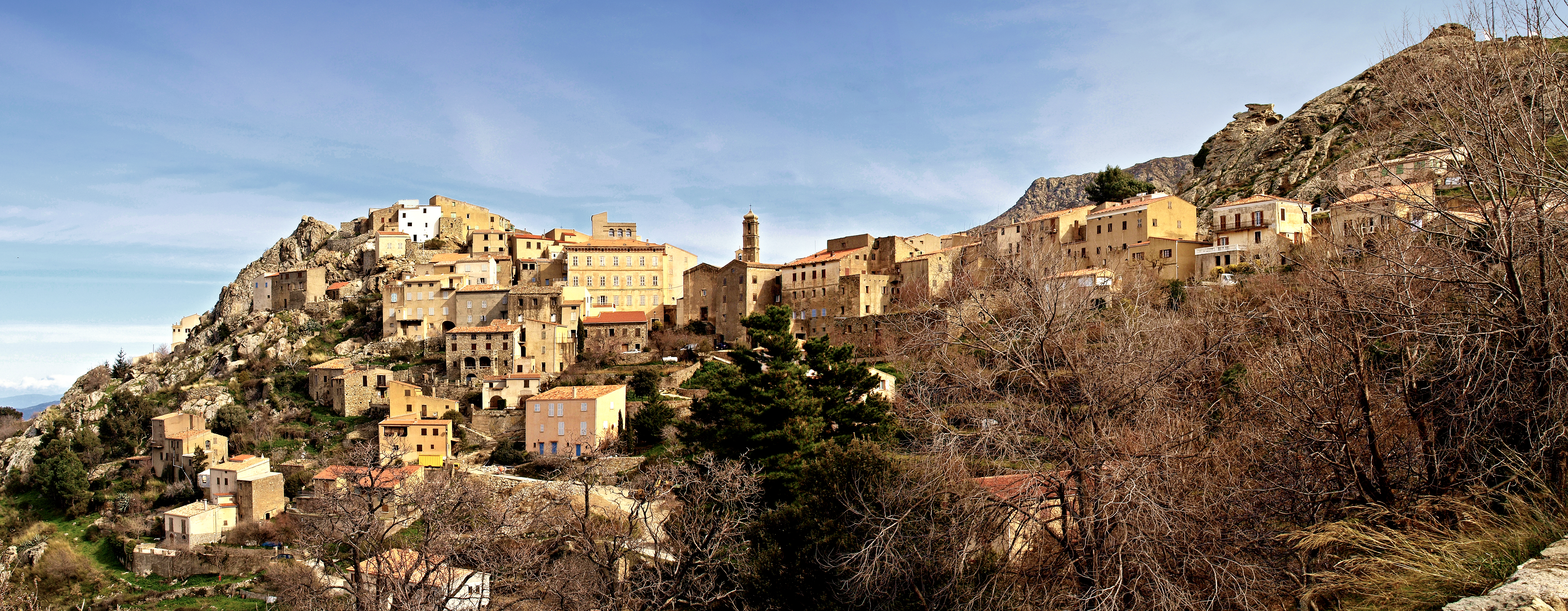 Speloncato (Corsica) - Vue de Speloncato